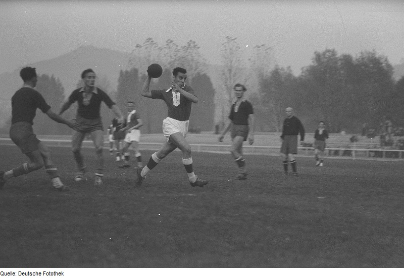 Original image description from the Deutsche Fotothek Handballspieler bei einem Spiel auf dem Feld